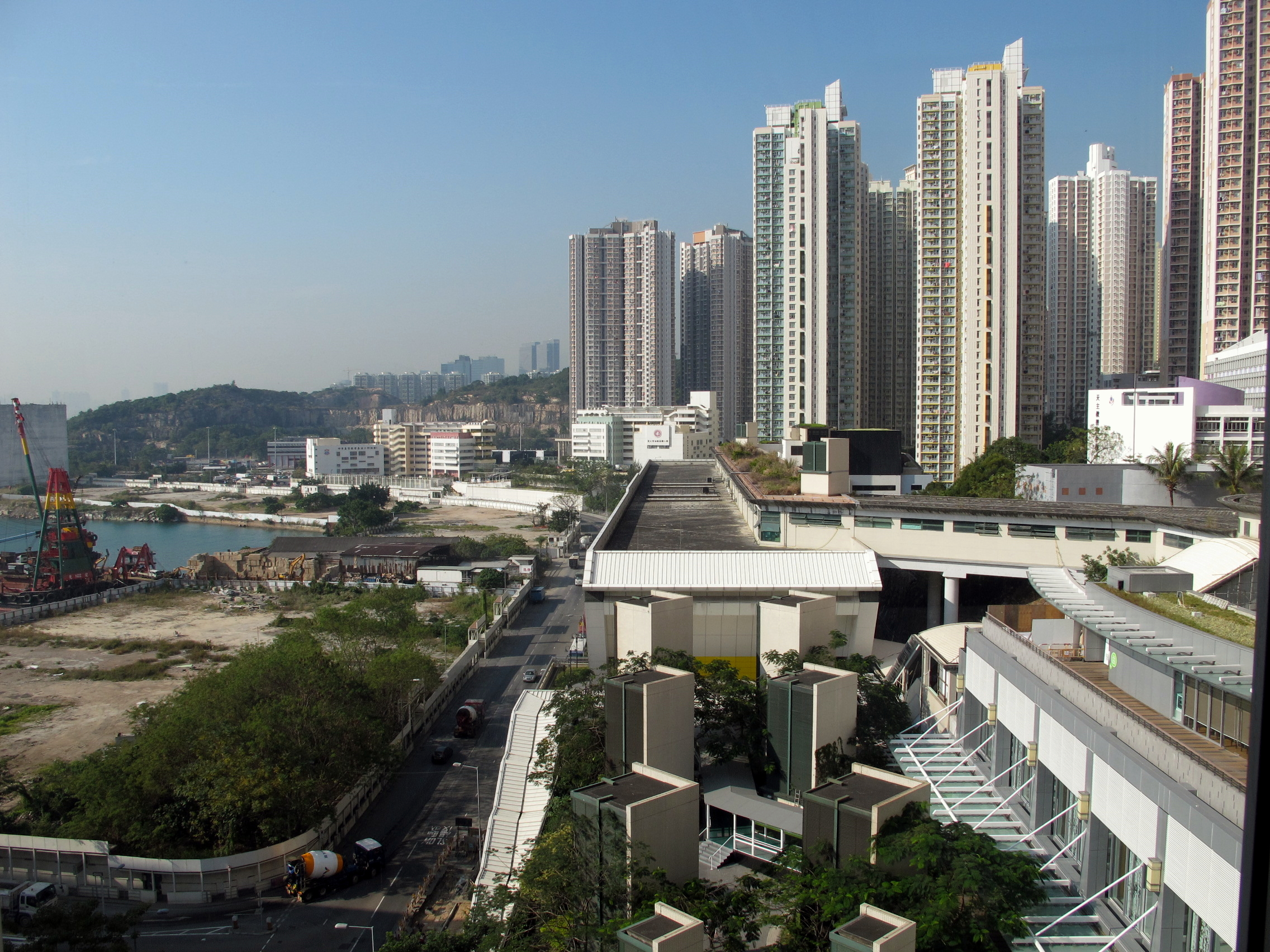 Yau Tong